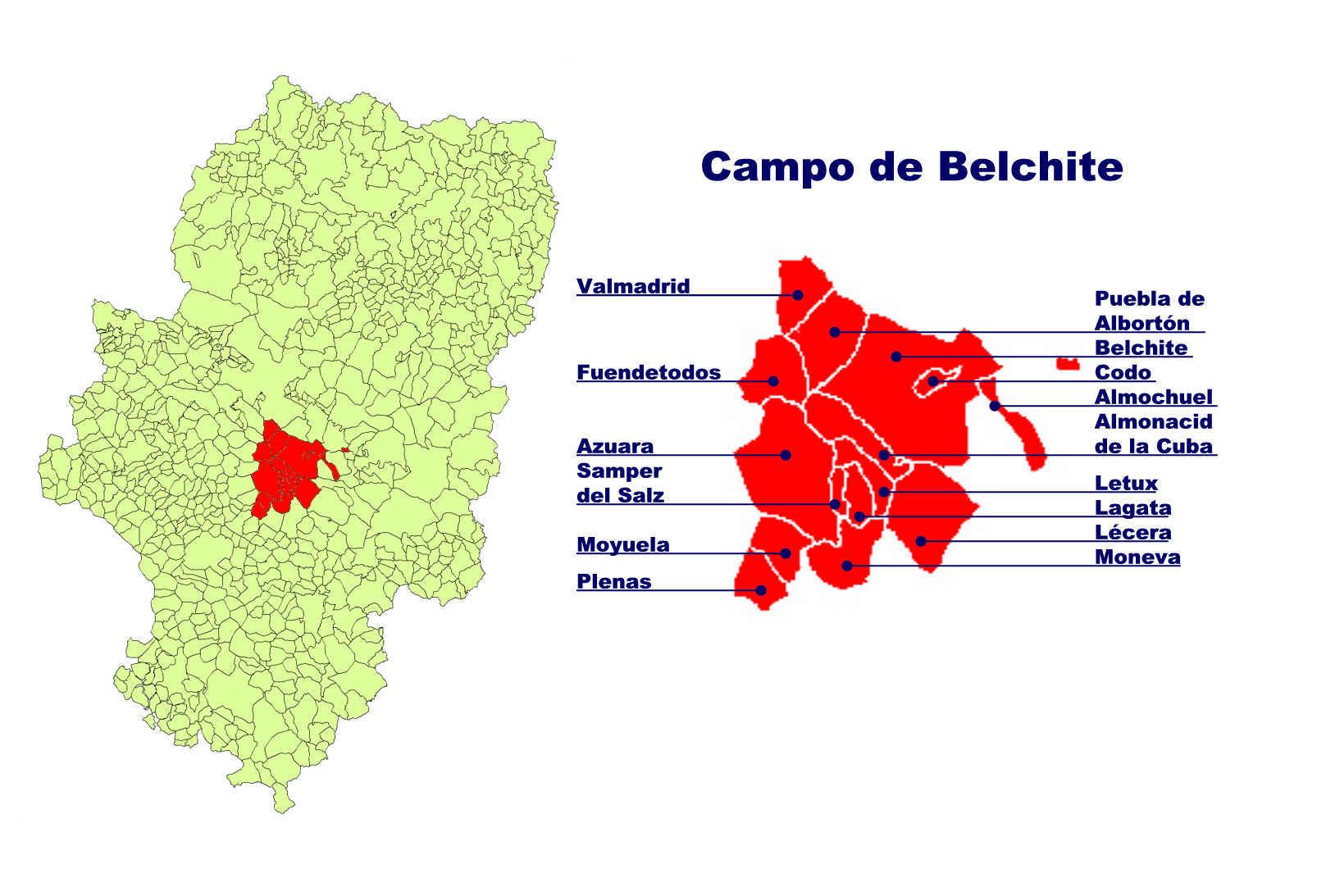 Comarca de Campo de Belchite Creado el 13.10.2005 por Ecelan en base a Image:Aragon municipalities.png